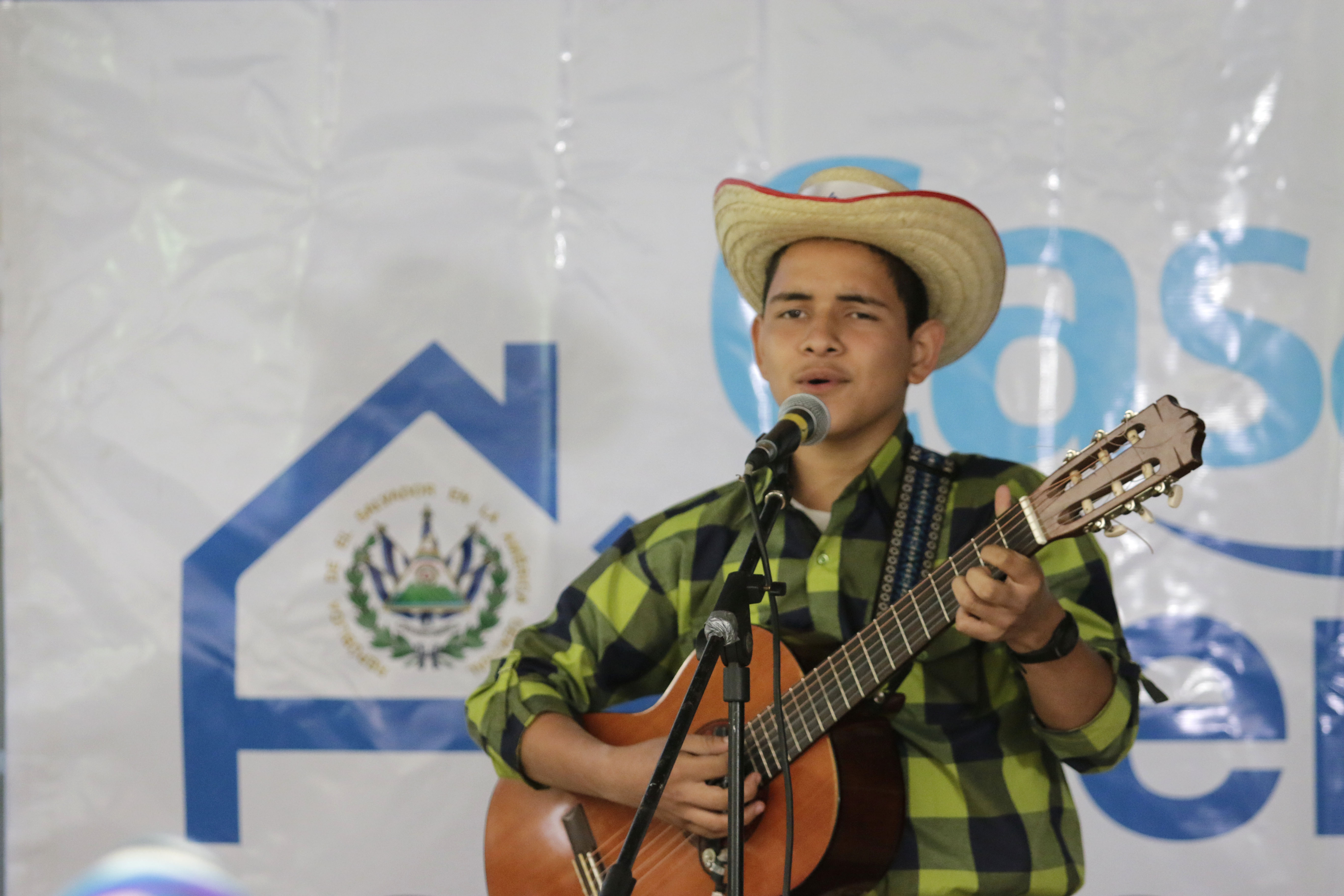 Jair Noyola.